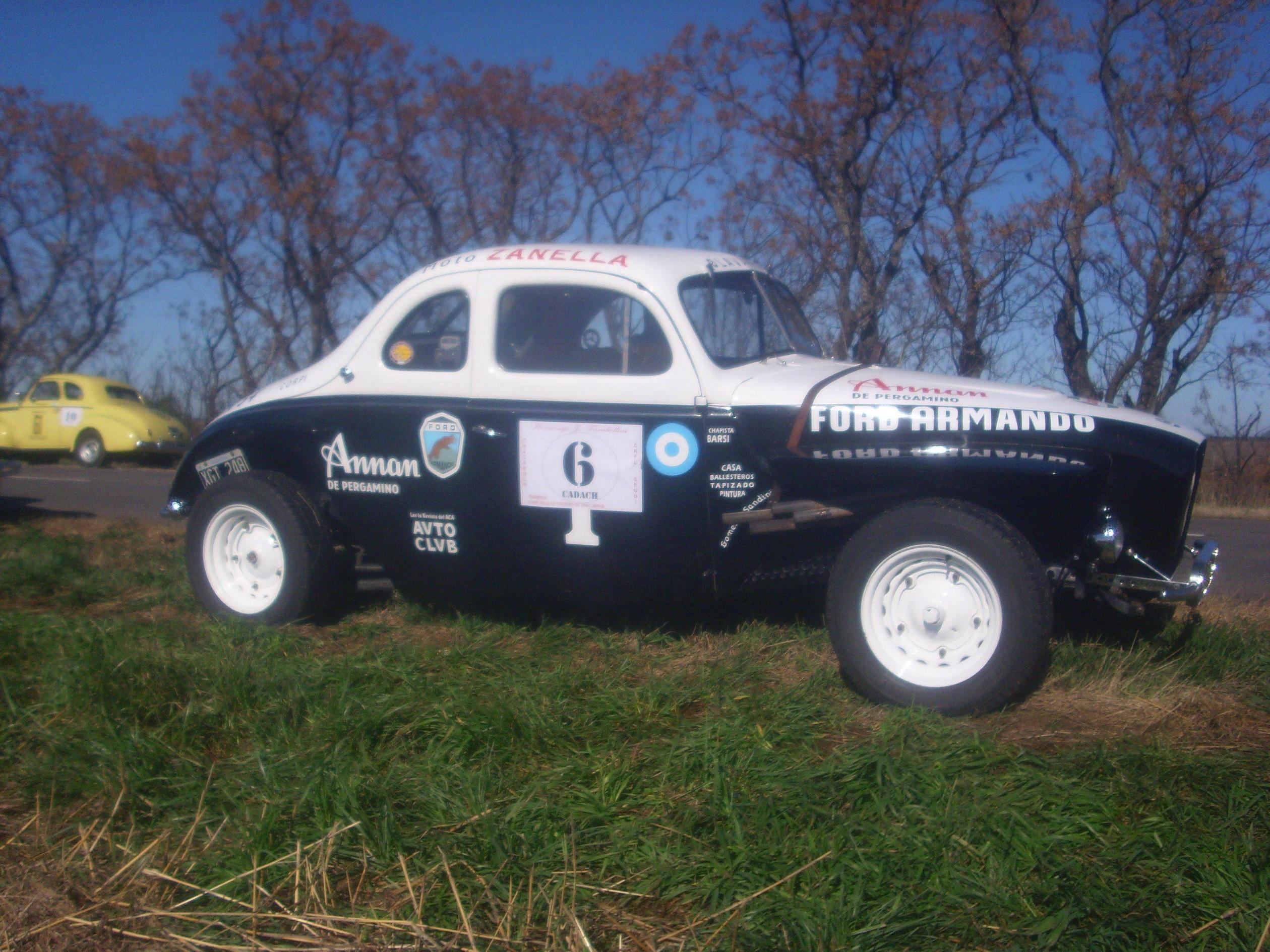 Réplica del Ford V8, conocido como La Galera, y piloteado por Dante Emiliozzi durante los campeonatos de 1962 y 1963. Esta réplica, rememora el original color negro y blanco que diera origen al apodo del vehículo, ya que el coche original se conserva pintado de azul y rojo, en el Museo de los Hermanos Emiliozzi.